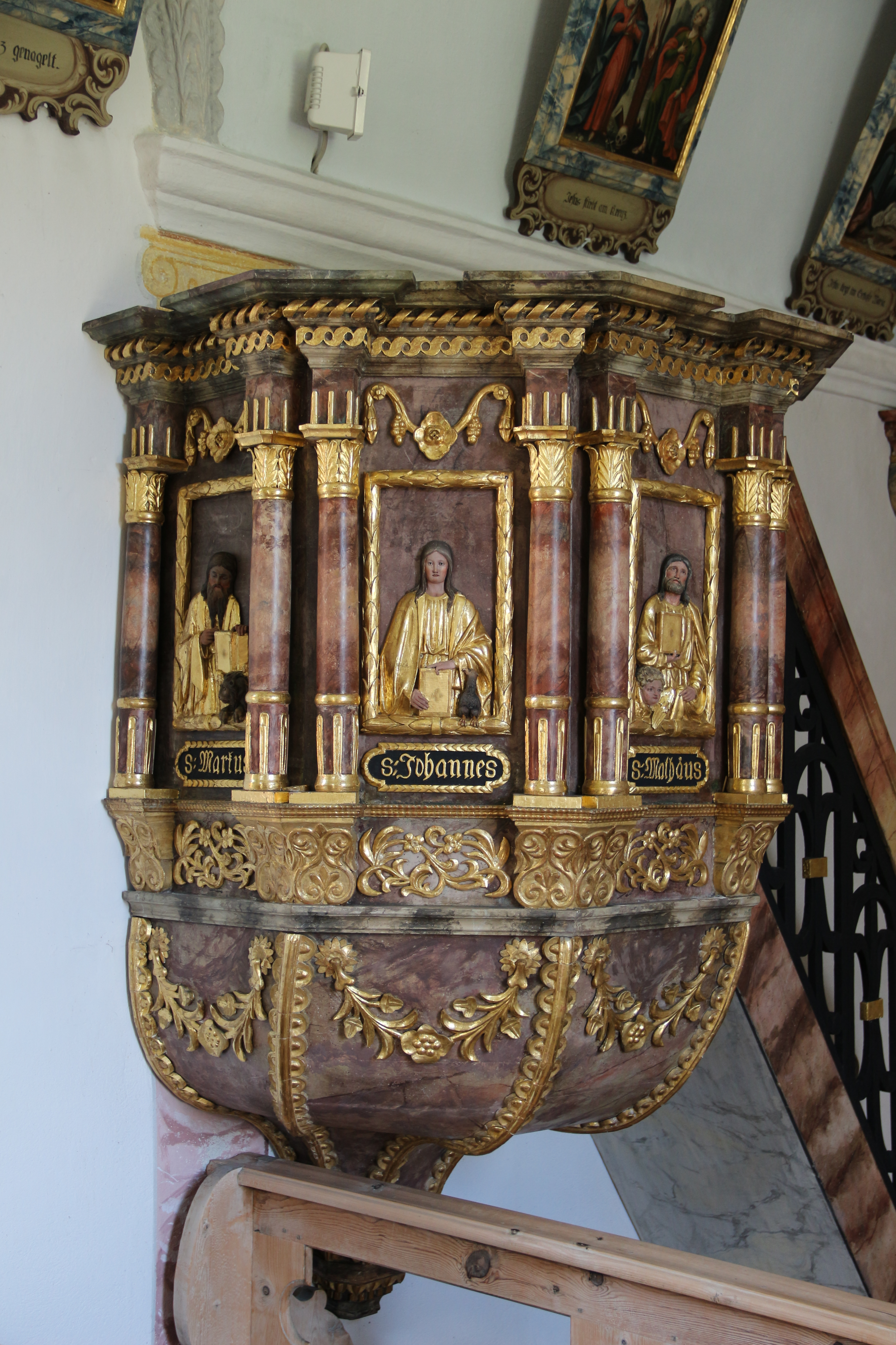 Ortskapelle Maria-Loreto in Au, Gemeinde Längenfeld, Tirol.